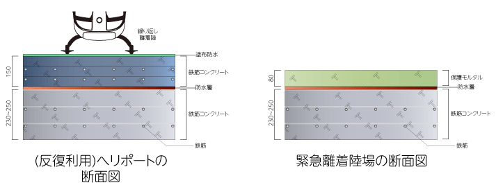 ヘリコプターの繰り返し離着陸が想定される「病院ヘリポート」と火事、災害時の時しか使用できない「緊急離着陸場」の断面構造の比較